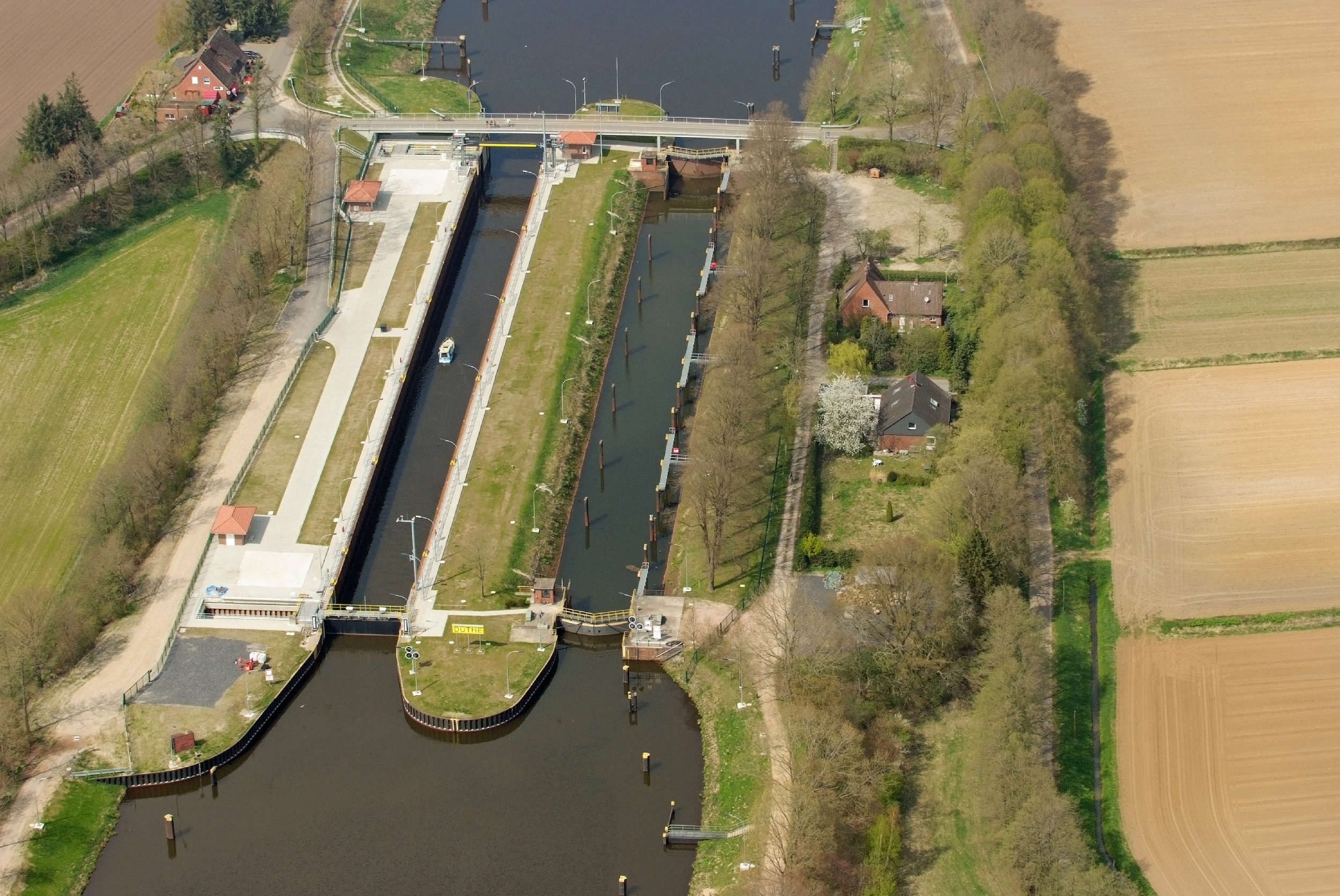 Fotoflug von Nordholz-Spieka nach Oldenburg und Papenburg